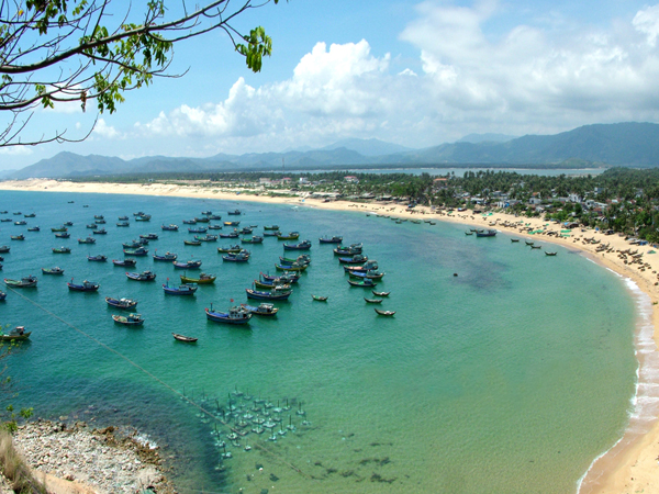 Tàu thuyền đánh bắt cá ven bờ biển Quảng Ninh